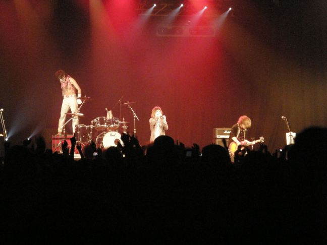 Golden bomber en Showcase a la Japan Expo en Juillet 2011